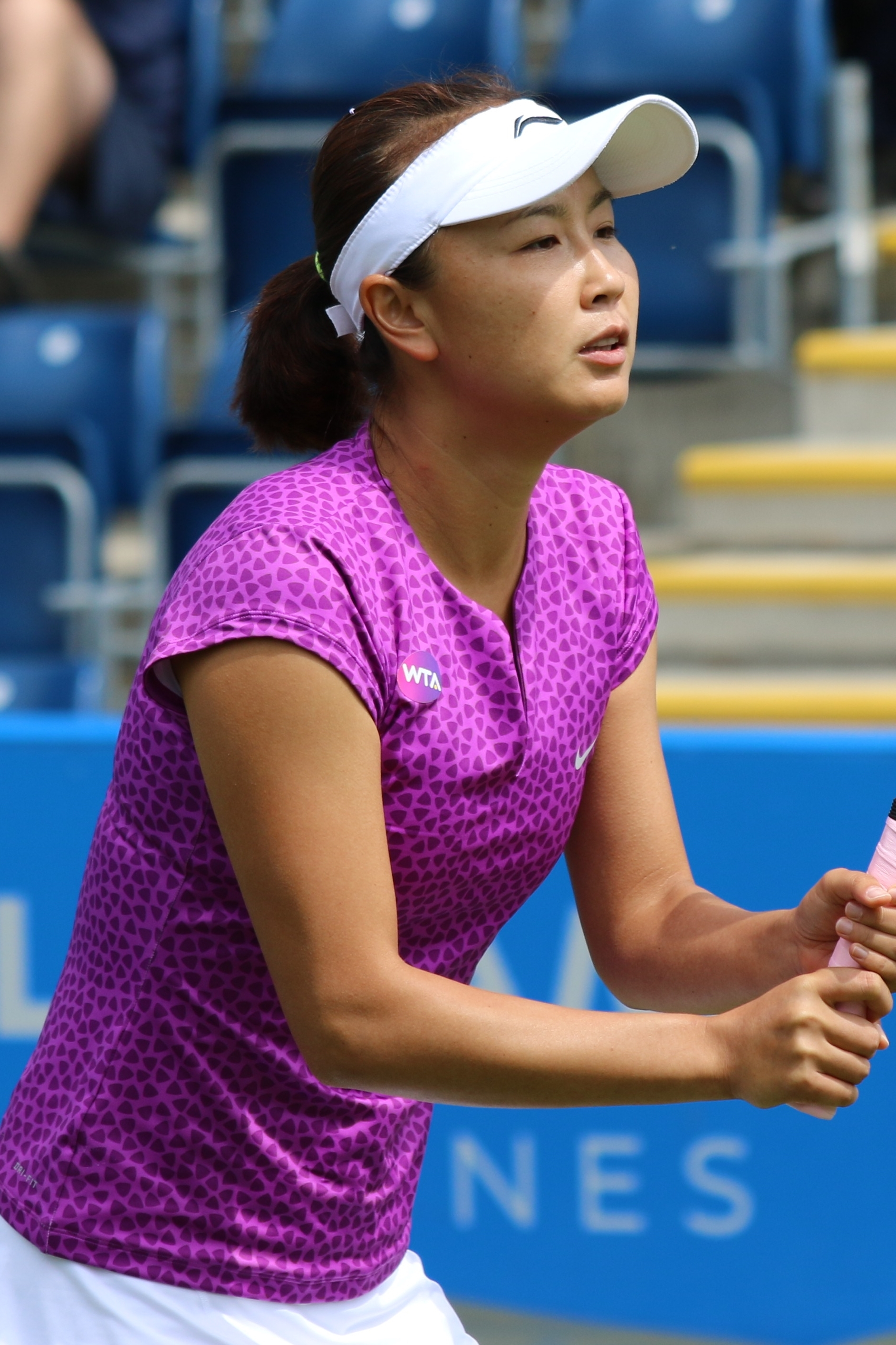 Peng BM16 (14)